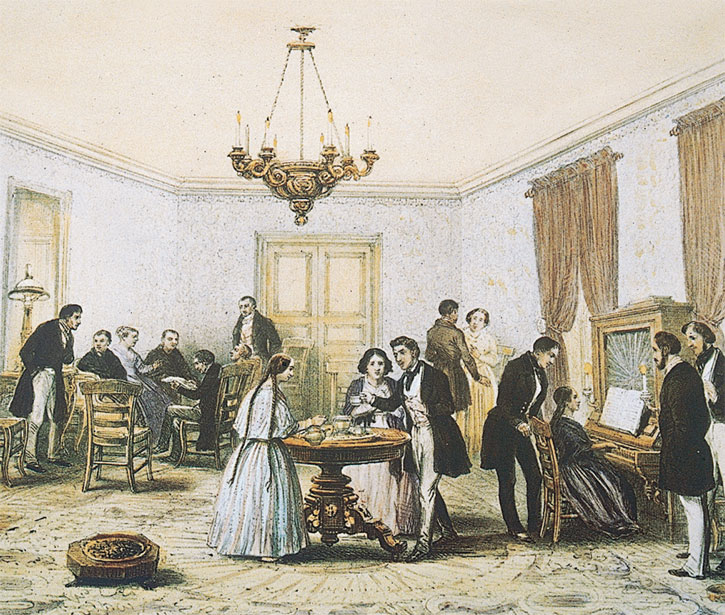 1790. Tertulia colonial Tertulia durante la colonia, 1790, en Santiago de Chile. Dibujo de Claudio Gay, 1848.